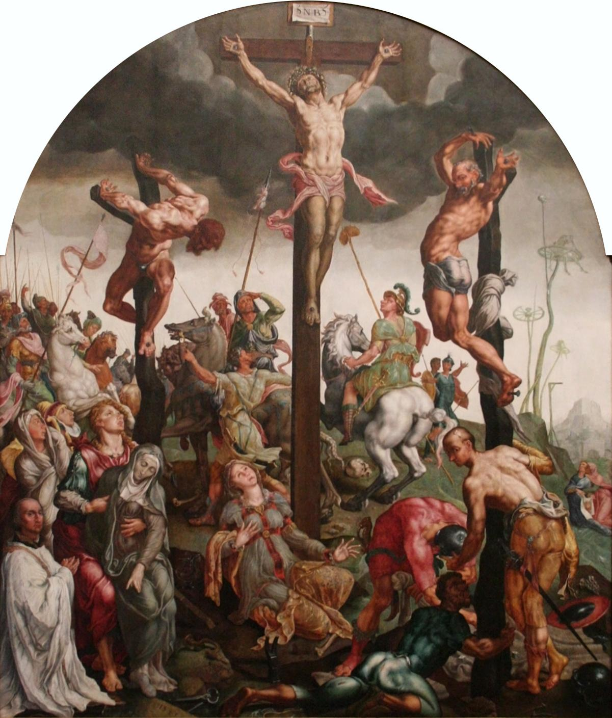 De Calvariebergtitle QS:P1476,nl:"De Calvarieberg" label QS:Lnl,"De Calvarieberg"